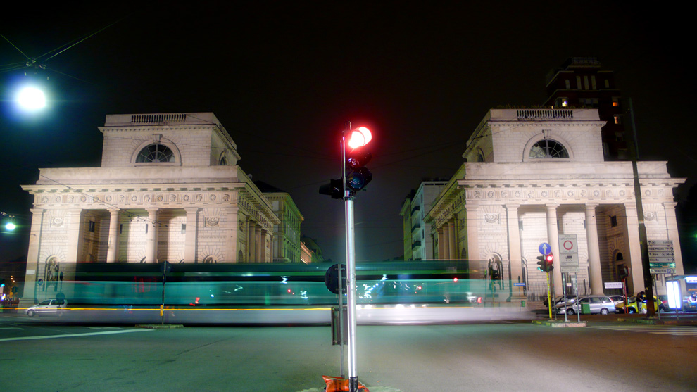 Un Jumbo tram passa davanti a Porta Venezia a Milano, Lombardia, Italia.